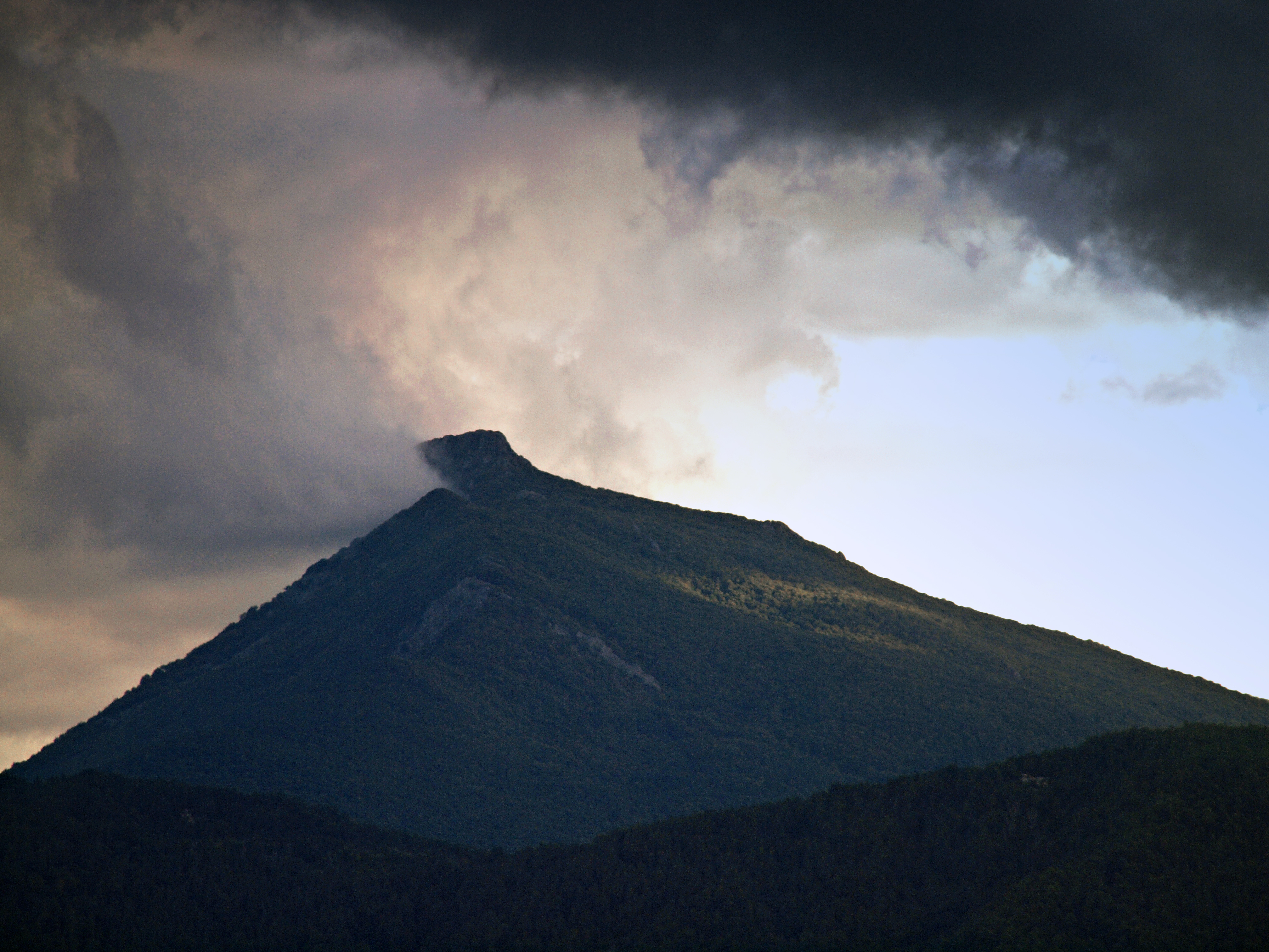 Bigorno (Corsica) - Vue du Monte San Petrone